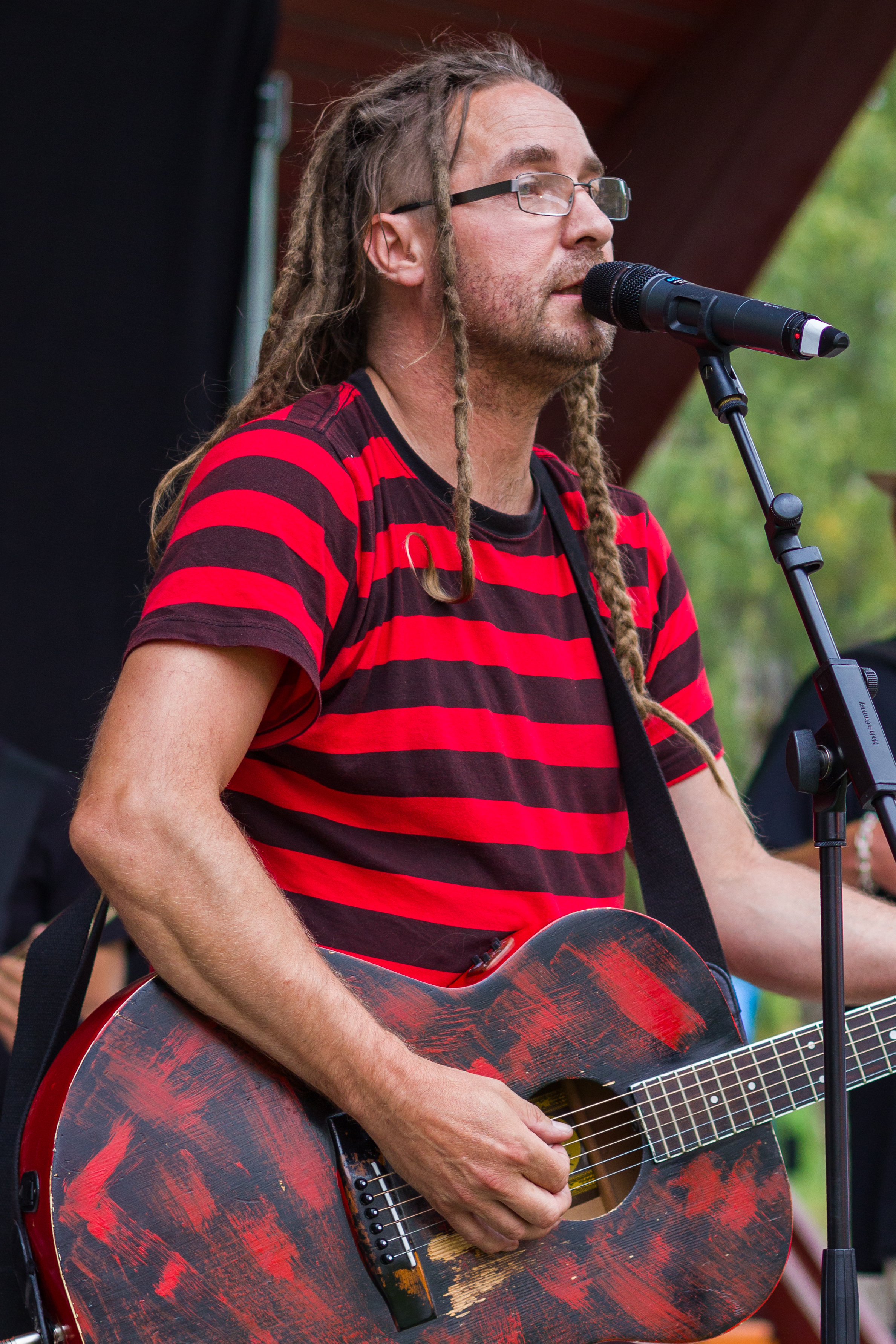 Per Granberg, med sitt band Cirkusorkestern. Familjedagarna Hedemora 2014.